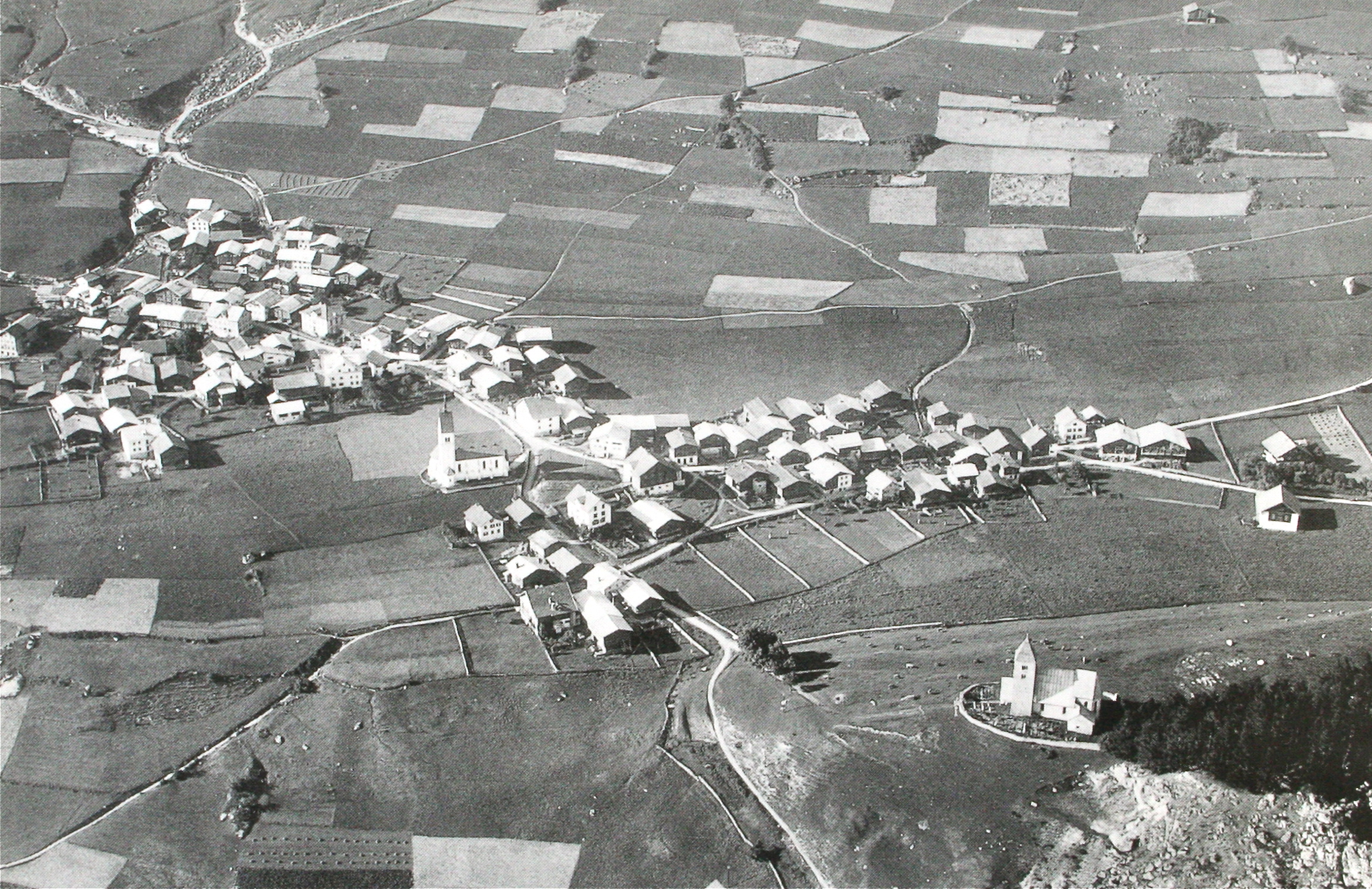 Falera um 1920 mit den Dorfteilen Paliu, Bigliac und Plaunca/Dual/Canal